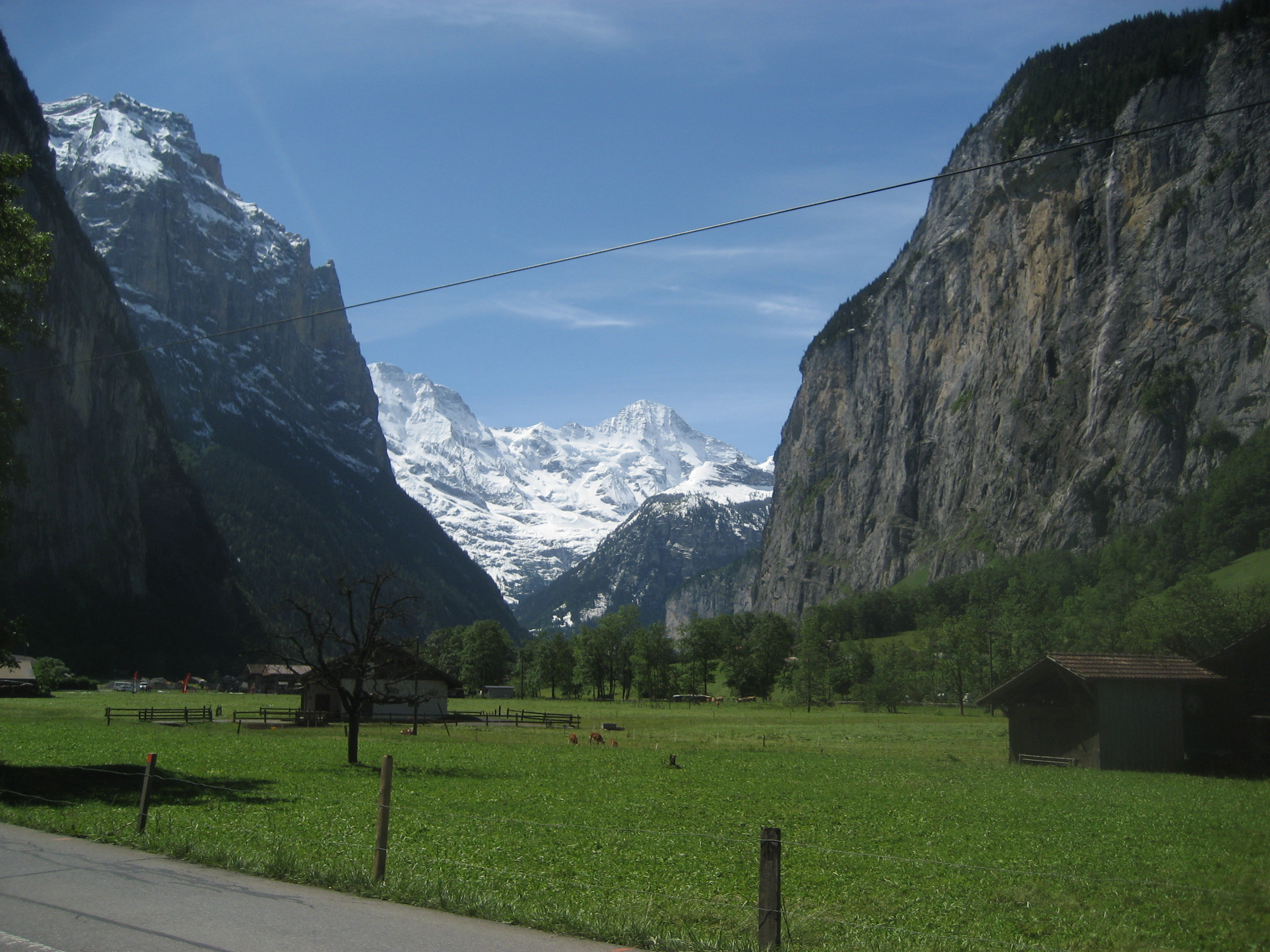 The valley near Lauterbrunnen, Switzerland.